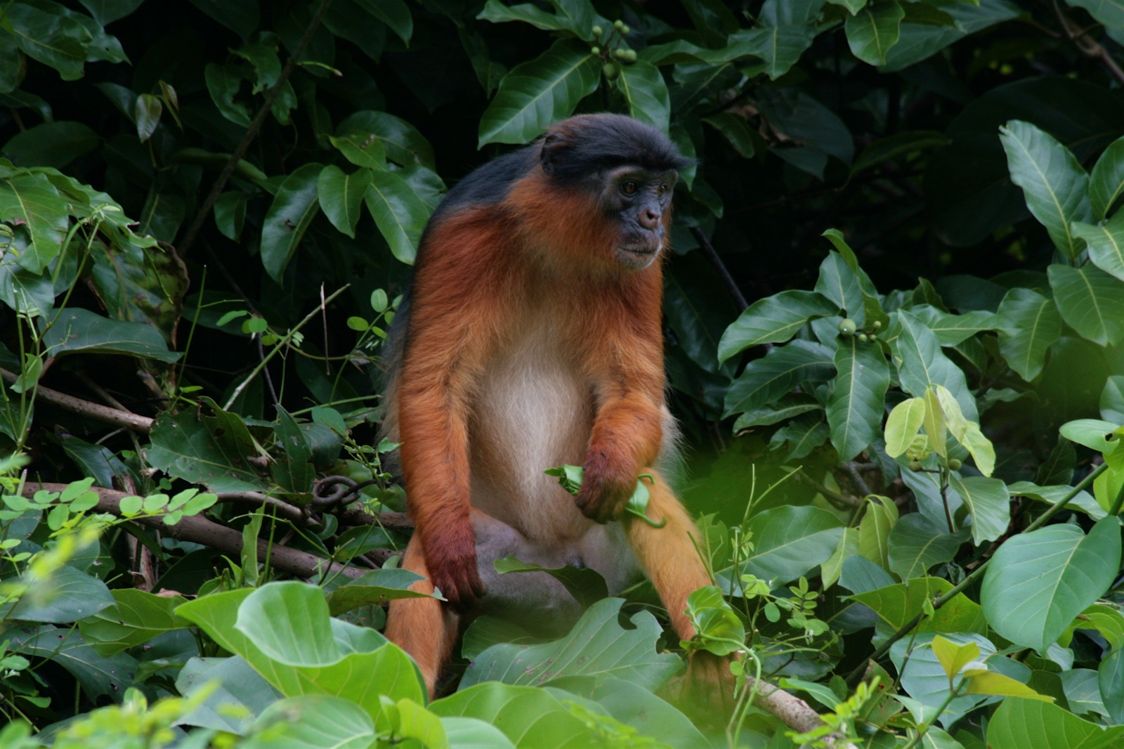 Piliocolobus temminckii